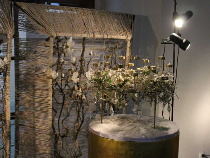 Brněnská růže 2014